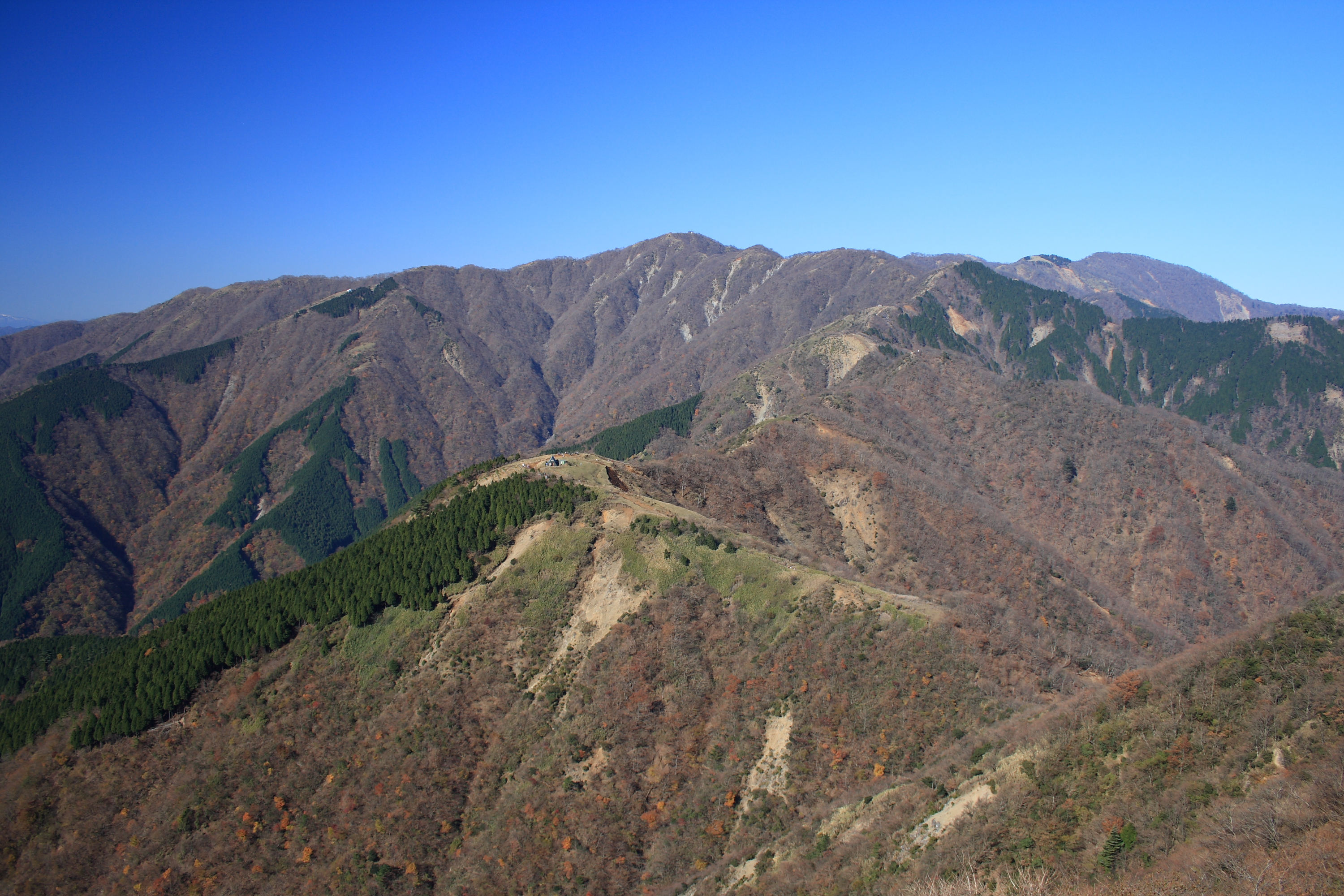 三ノ塔より望む塔ノ岳